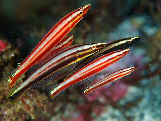 シロタスキベラ Hologymnosus doliatus